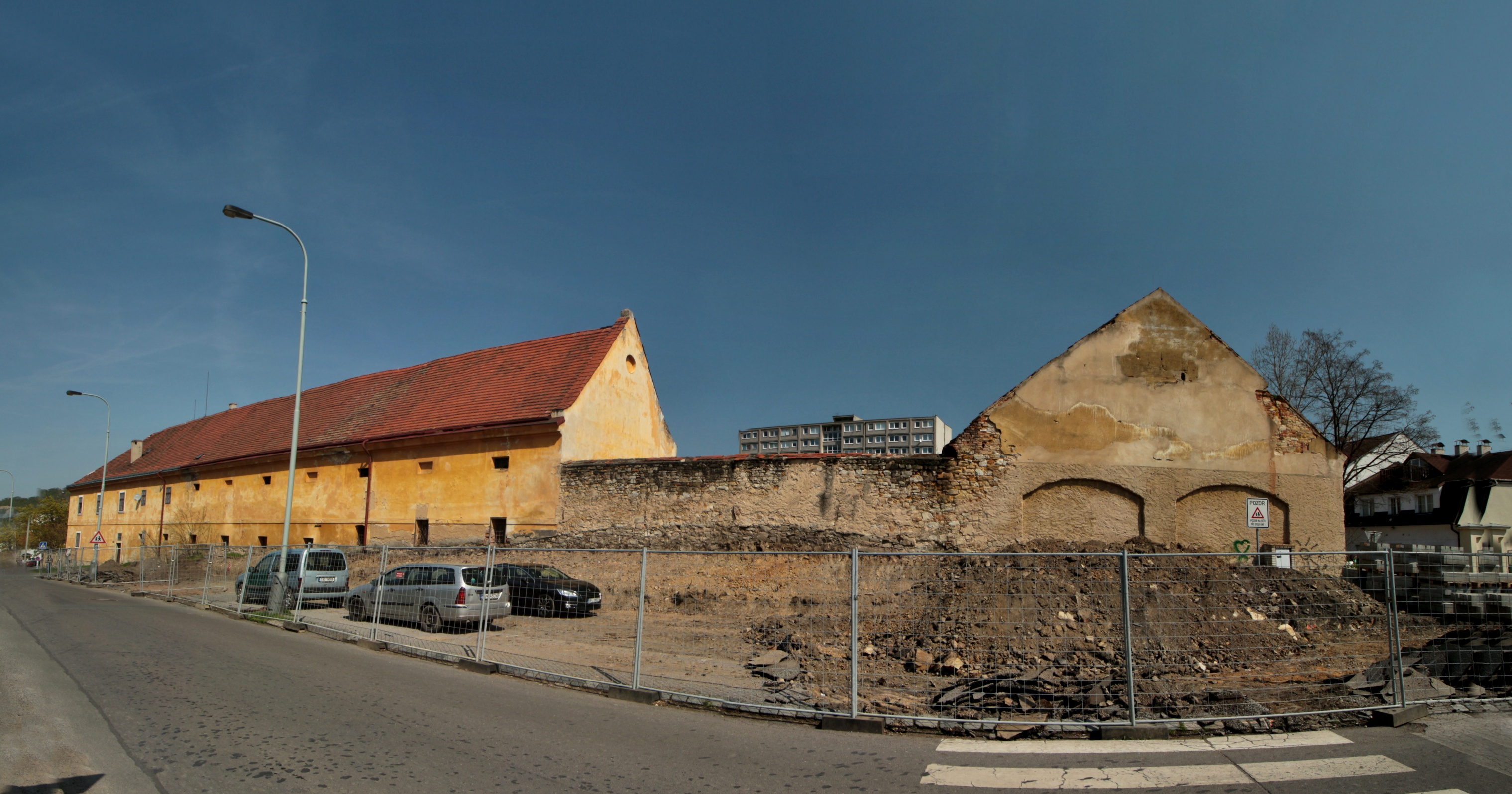 Křižovnický dvůr v Praze-Hloubětíně